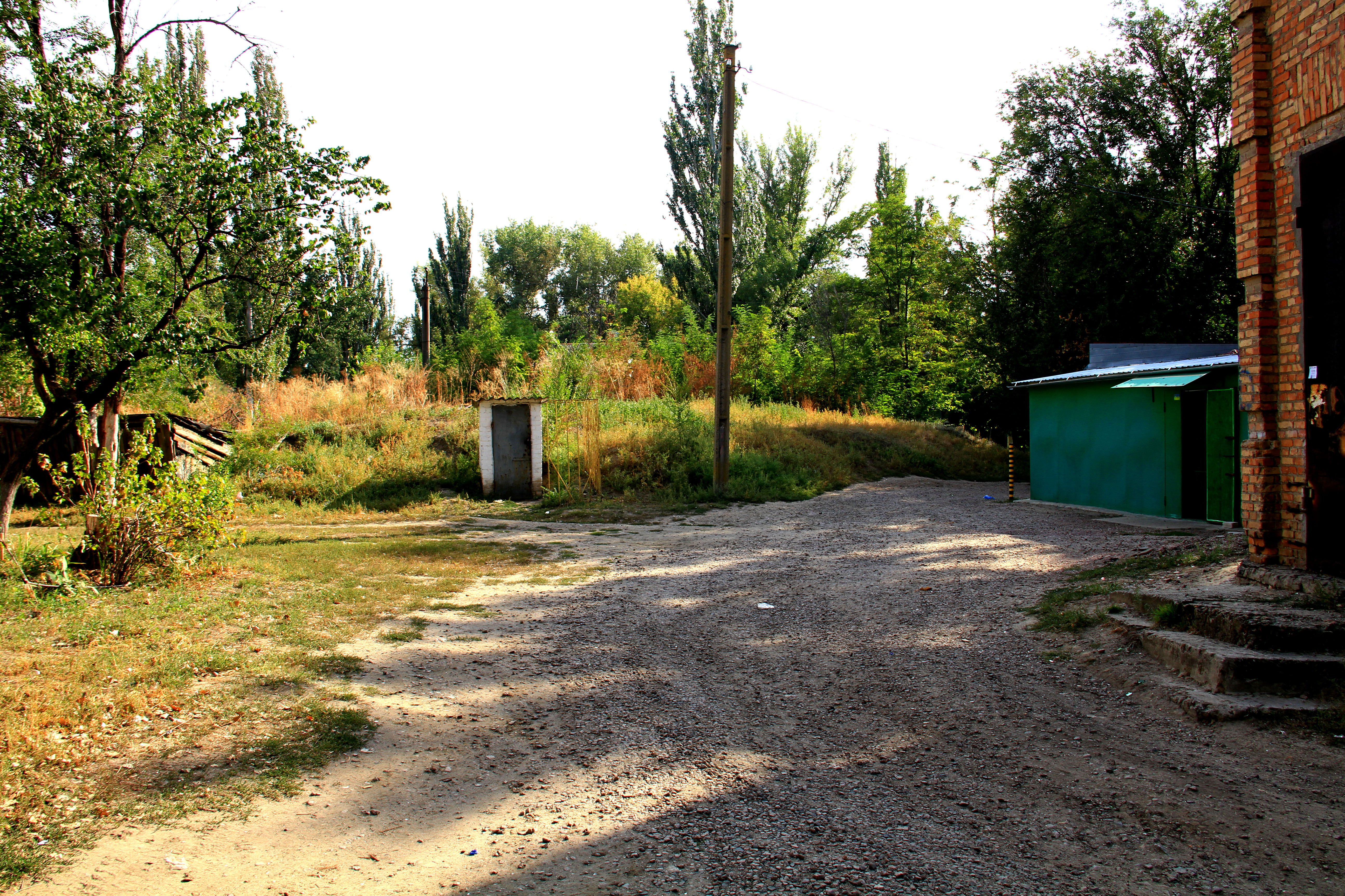 Курган, Марганець, вул. 40 років Жовтня, 6, центр, за 10 м встановлена водонапірна башта